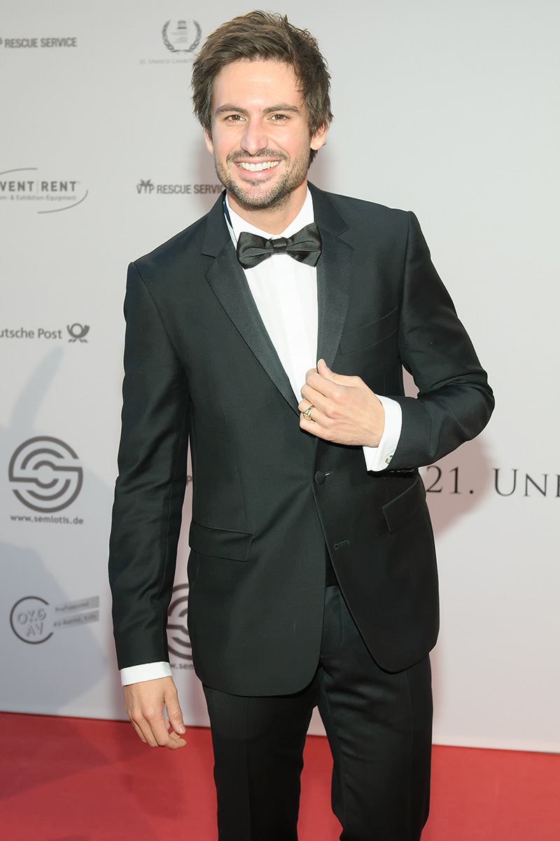 Tom Beck auf der 21. UNESCO Charity Gala am 27. Oktober 2012 in Düsseldorf.